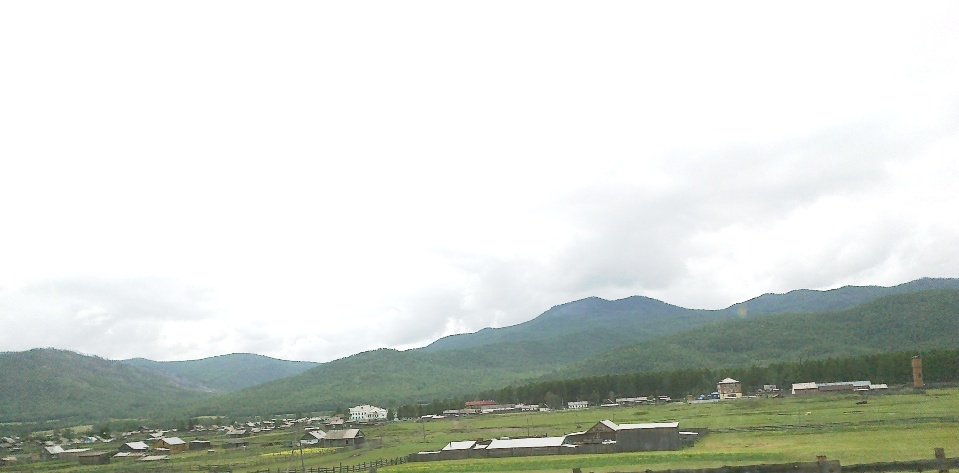 улус Цакир.